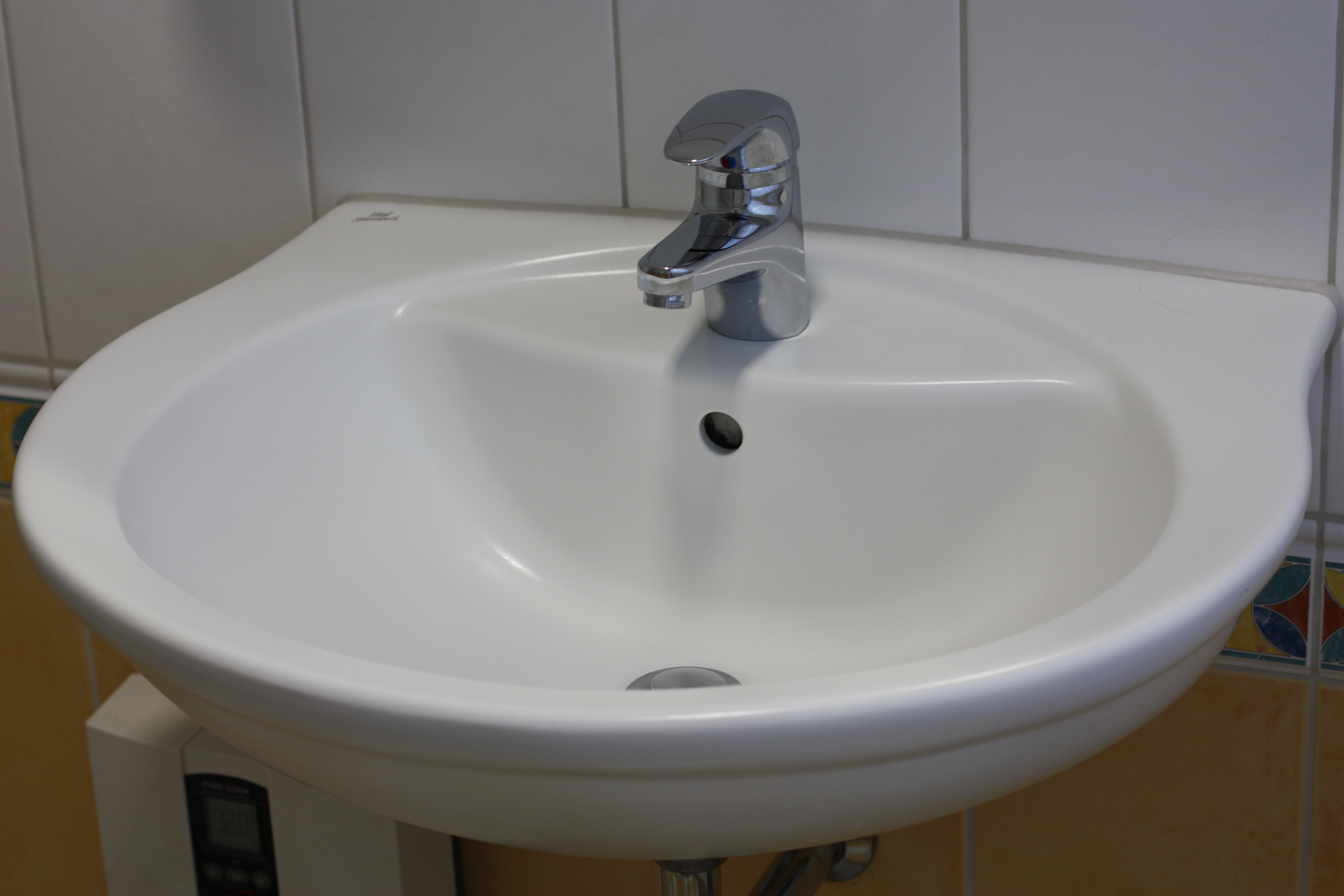 Waschbecken